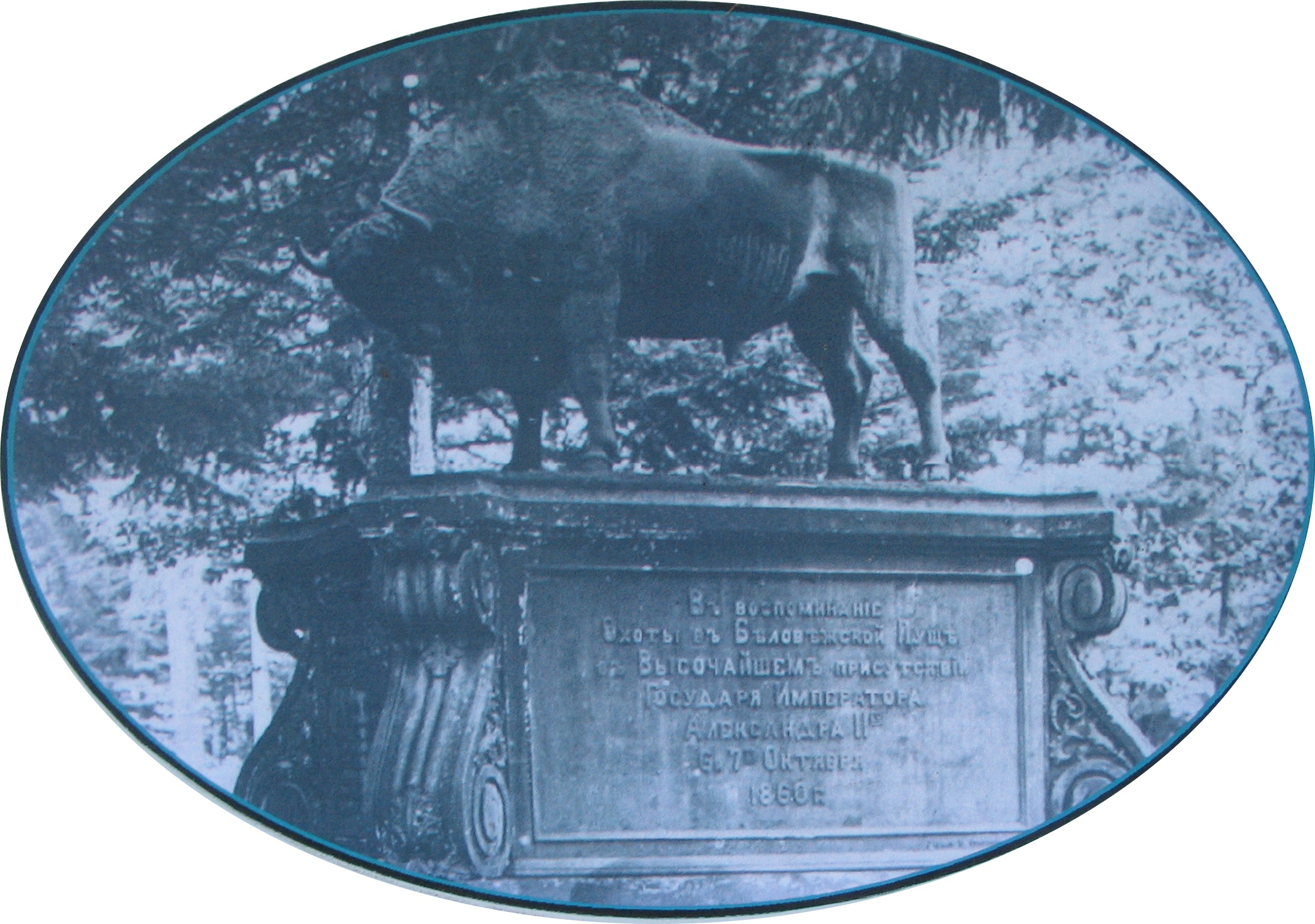 stary pomnik Żubra w osadzie Zwierzyniec, gmina Białowieża